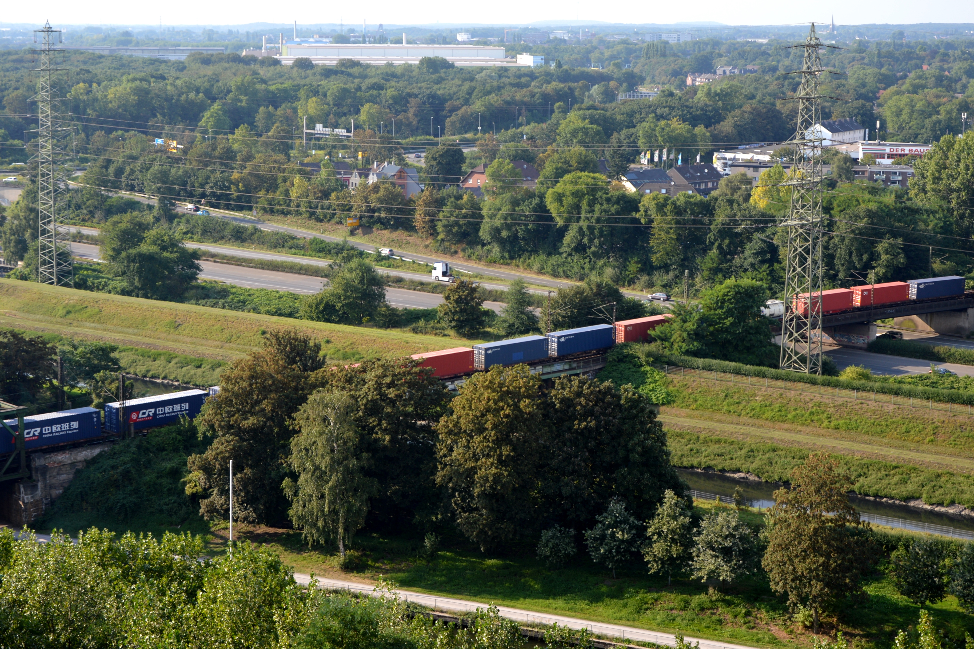 Eisenbahn mit Container der China Railway Express Co. überquert den Emscherkanal und die BAB 42. Im Vordergrund der Rhein-Herne-Kanal.